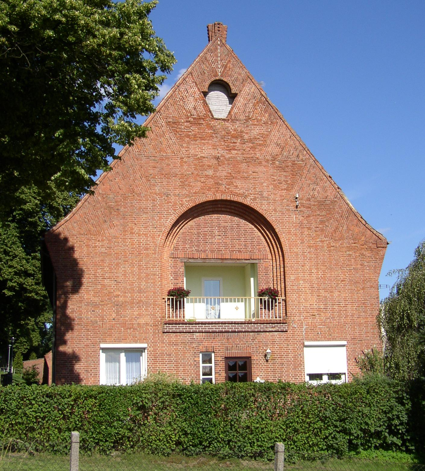 Haus an der Bundesstraße 5 in Dersenow in Mecklenburg-Vorpommern, Deutschland